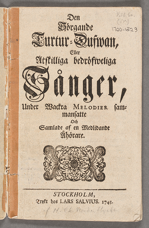 Den sörgande turtur-dufwan, eller Åtskilliga bedröfweliga sånger, under wackra melodier sammansatte och samlade af en medlidande åhörare, title page